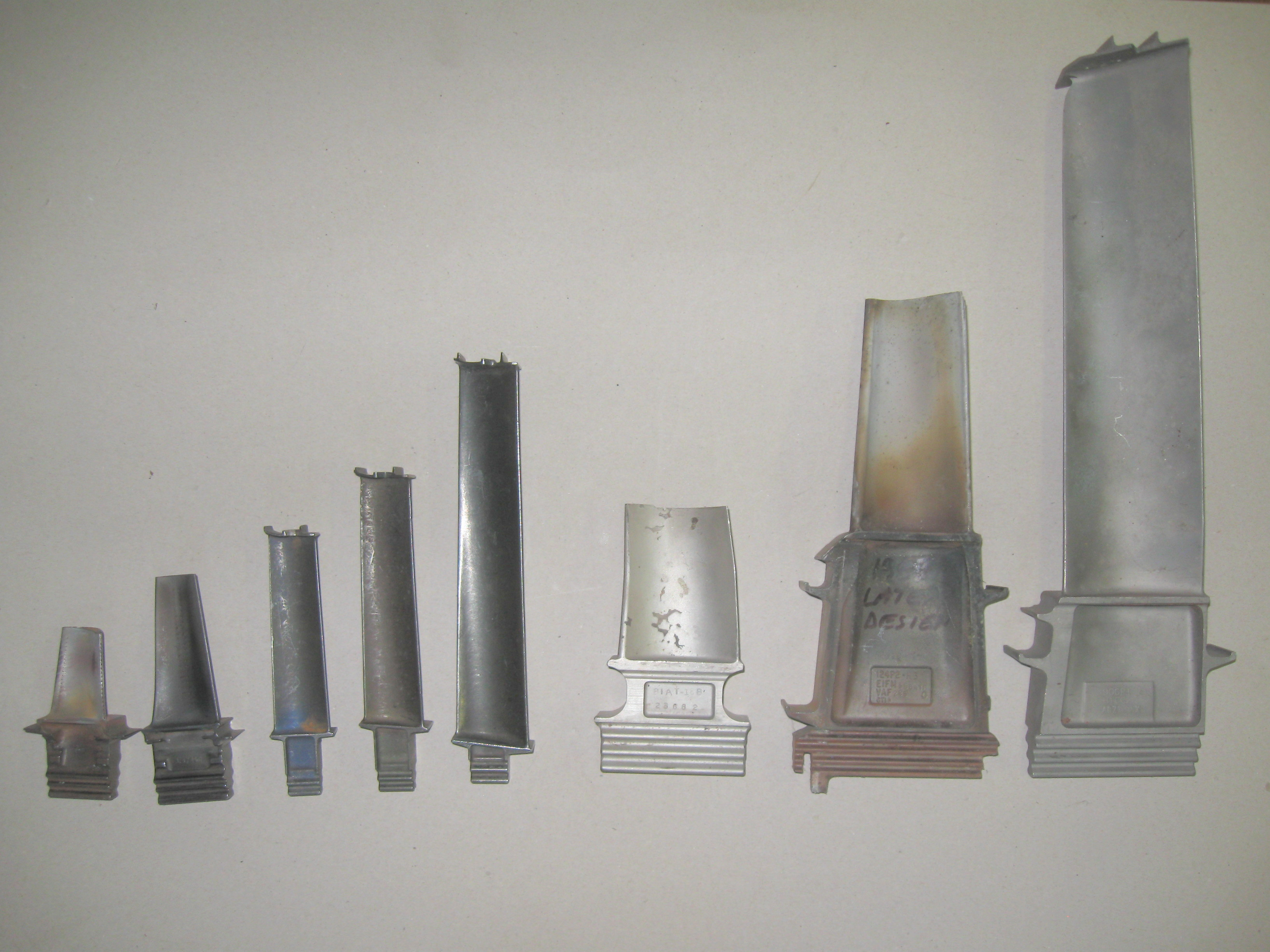 Loopschoepen van gasturbines